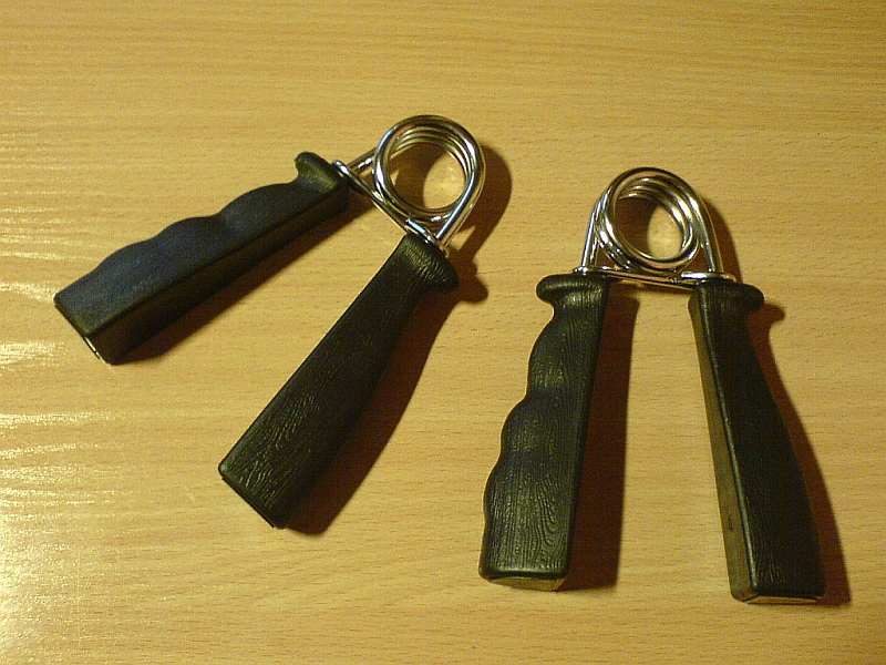 Espanderis (sporte)